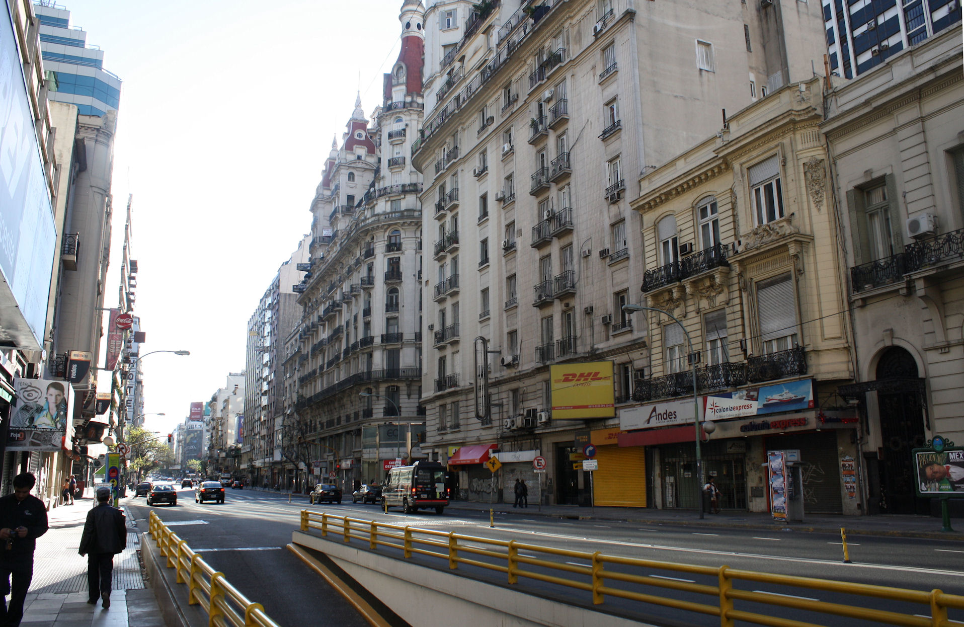 Córdoba Avenue, between Maipú and Esmeralda Streets. San Nicolás, Buenos Aires.